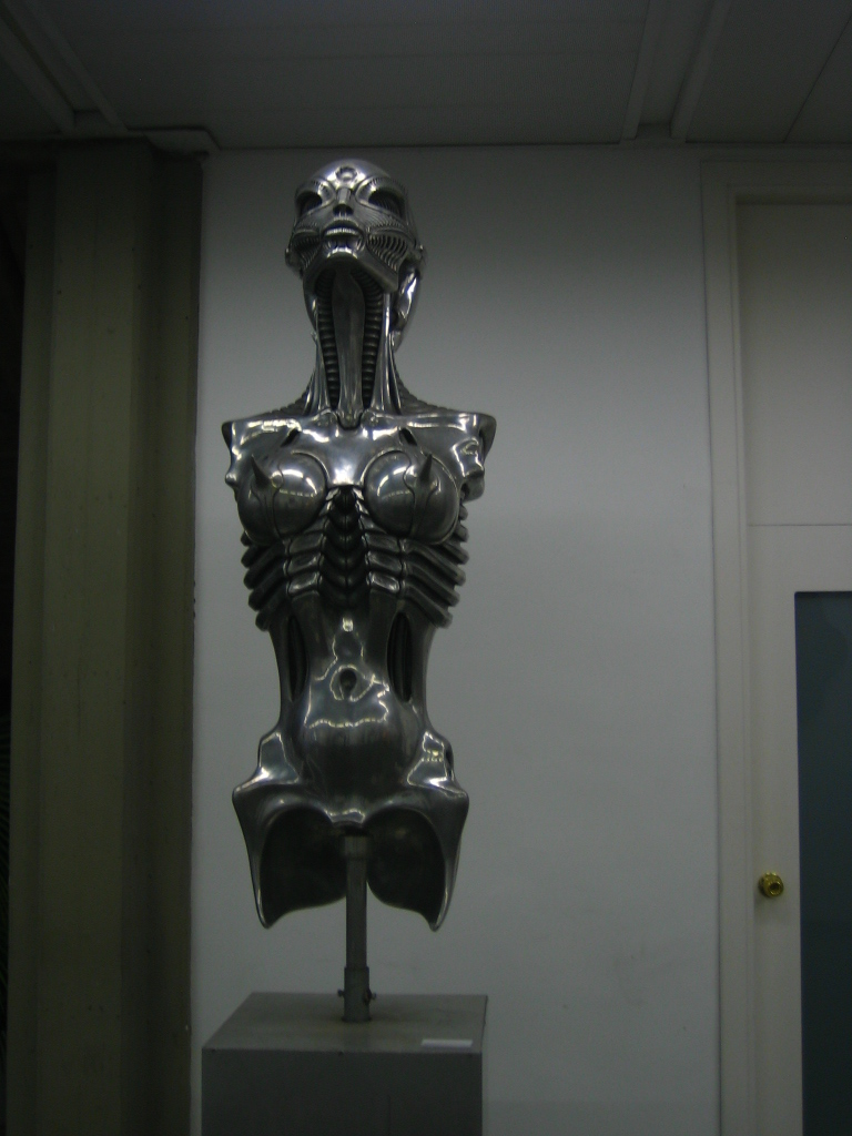 biomechanoid, exposición HR Giger en la UPV (Valencia) en noviembre de 2007